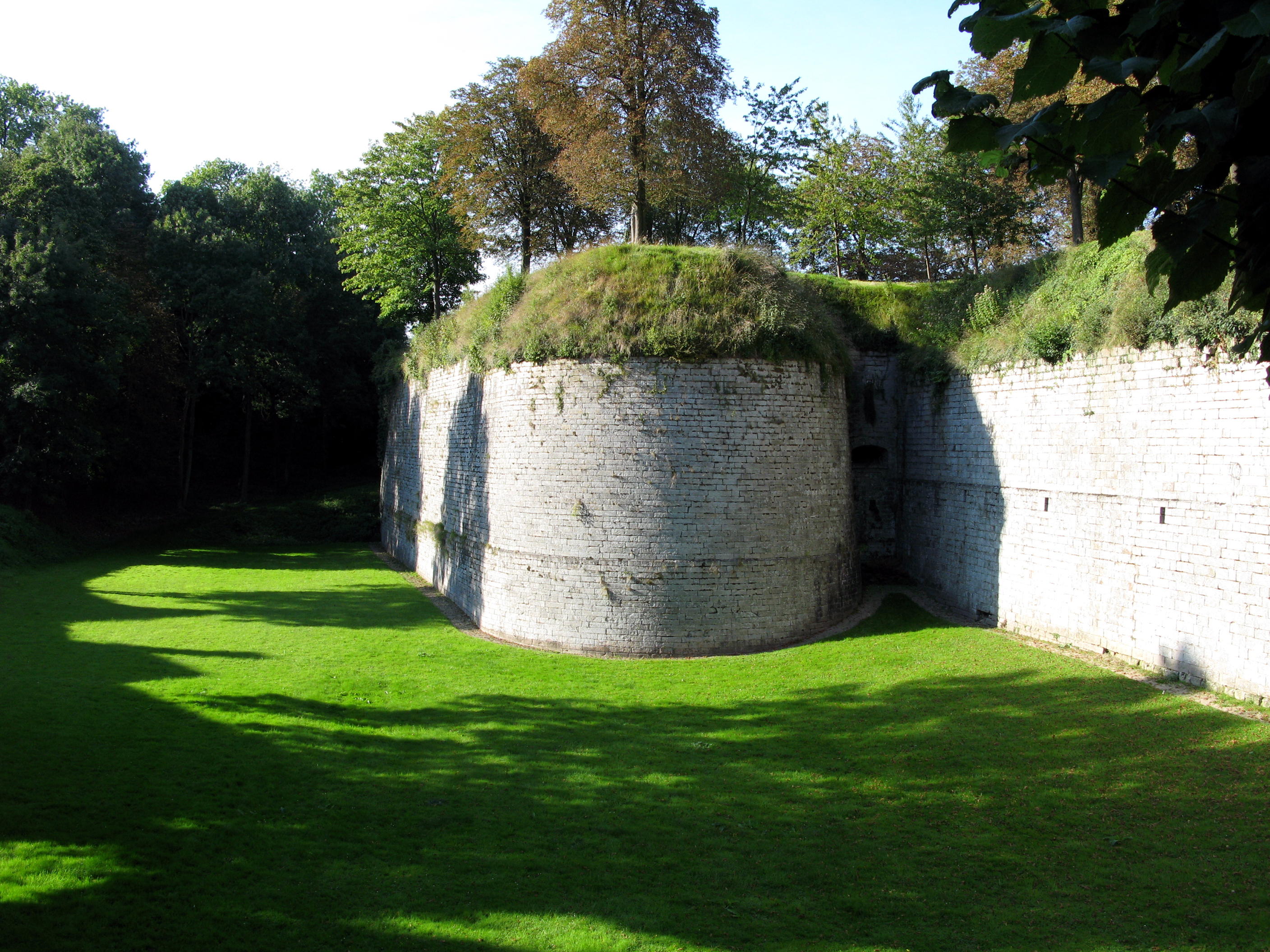 Doullens (Somme, France) - Intérieur de la citadelle. . . .